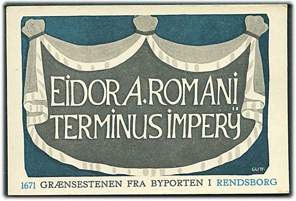 Viggo Guttorm-Pedersen: Grænsestenen fra byporten i Rendsborg